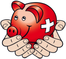 Logo des Initiativekomitees der Goldinitiative